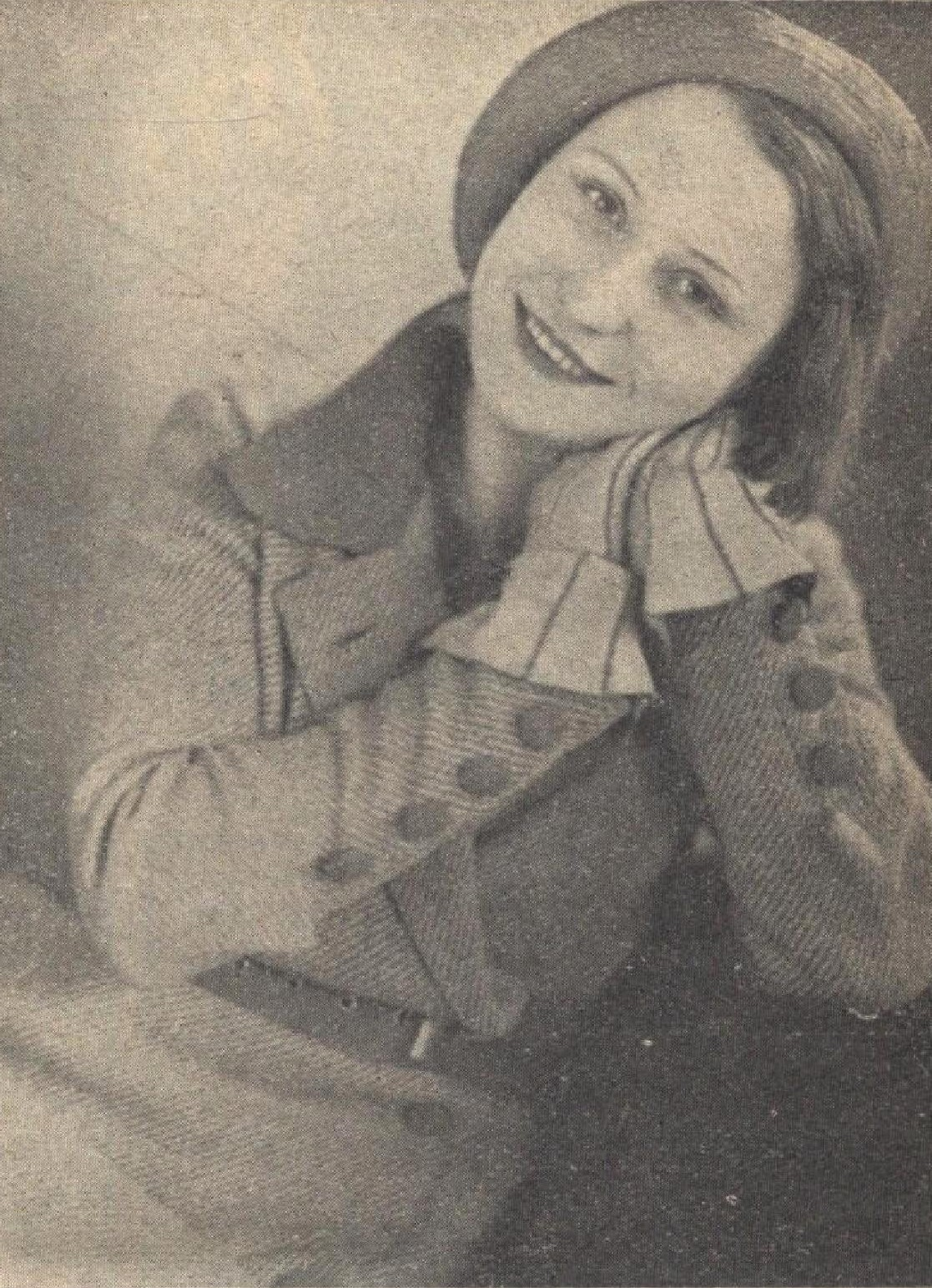 Zdeňka Švabíková (1912-1994), česká herečka